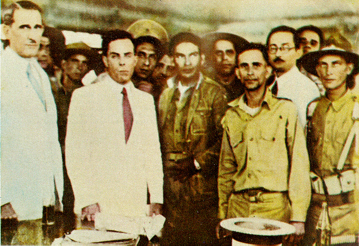 The leaders of the 1933 Sergeants revolution: Dr. Ramón Grau, Sergio Carbó and Sgt. Fulgencio Batista